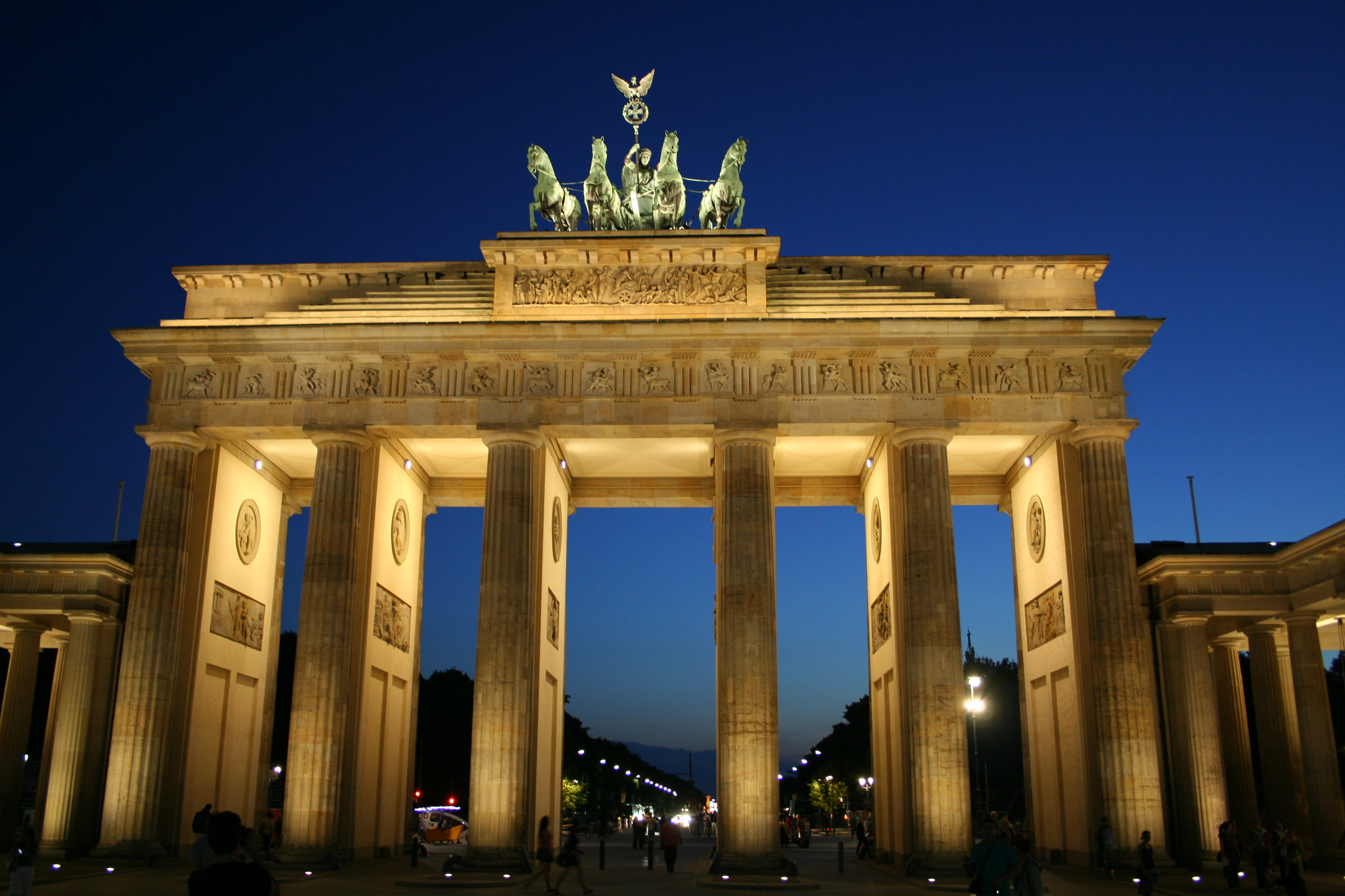 Berlino - Duomo